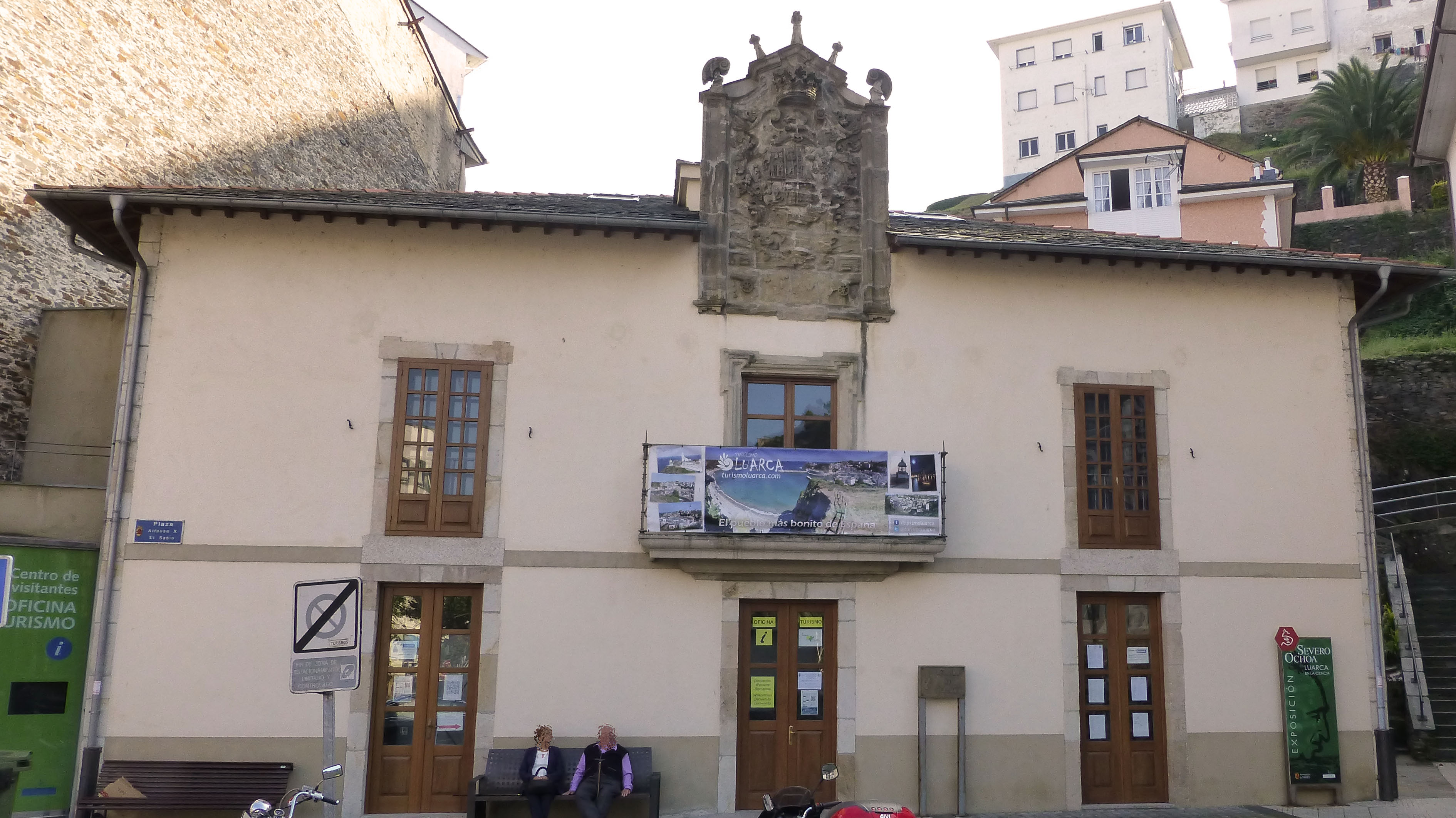 Casa de los Marqueses de Gamoneda Fonda el Cocinero